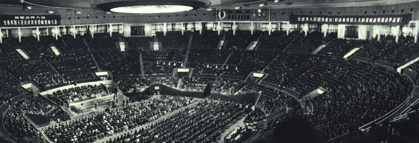 1966-06 1966年北京支持美国人民反对美国侵略越南大会